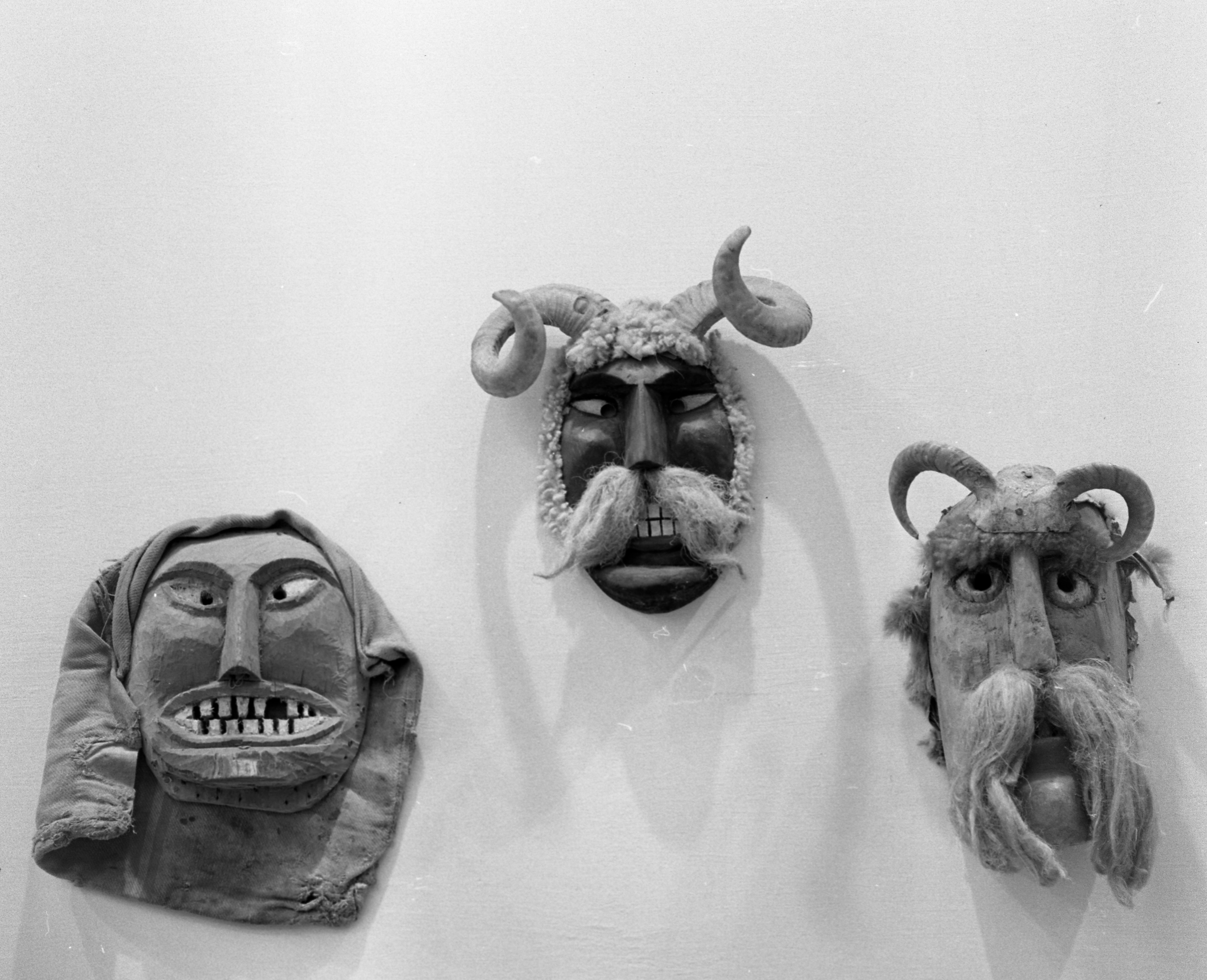 Tags: Busó-walking